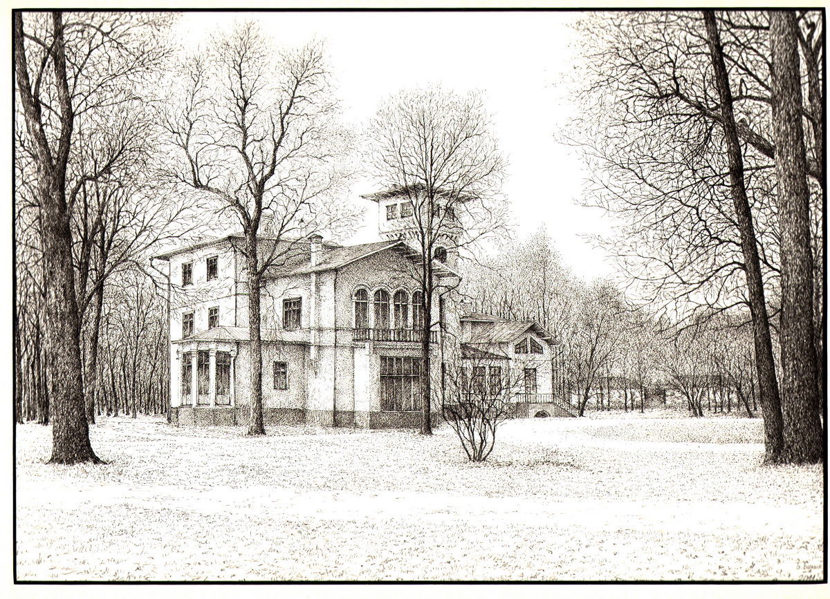 Беларуская (тарашкевіца): Пружанскі палацык. Малюнак Барыса Бокшы. 2010